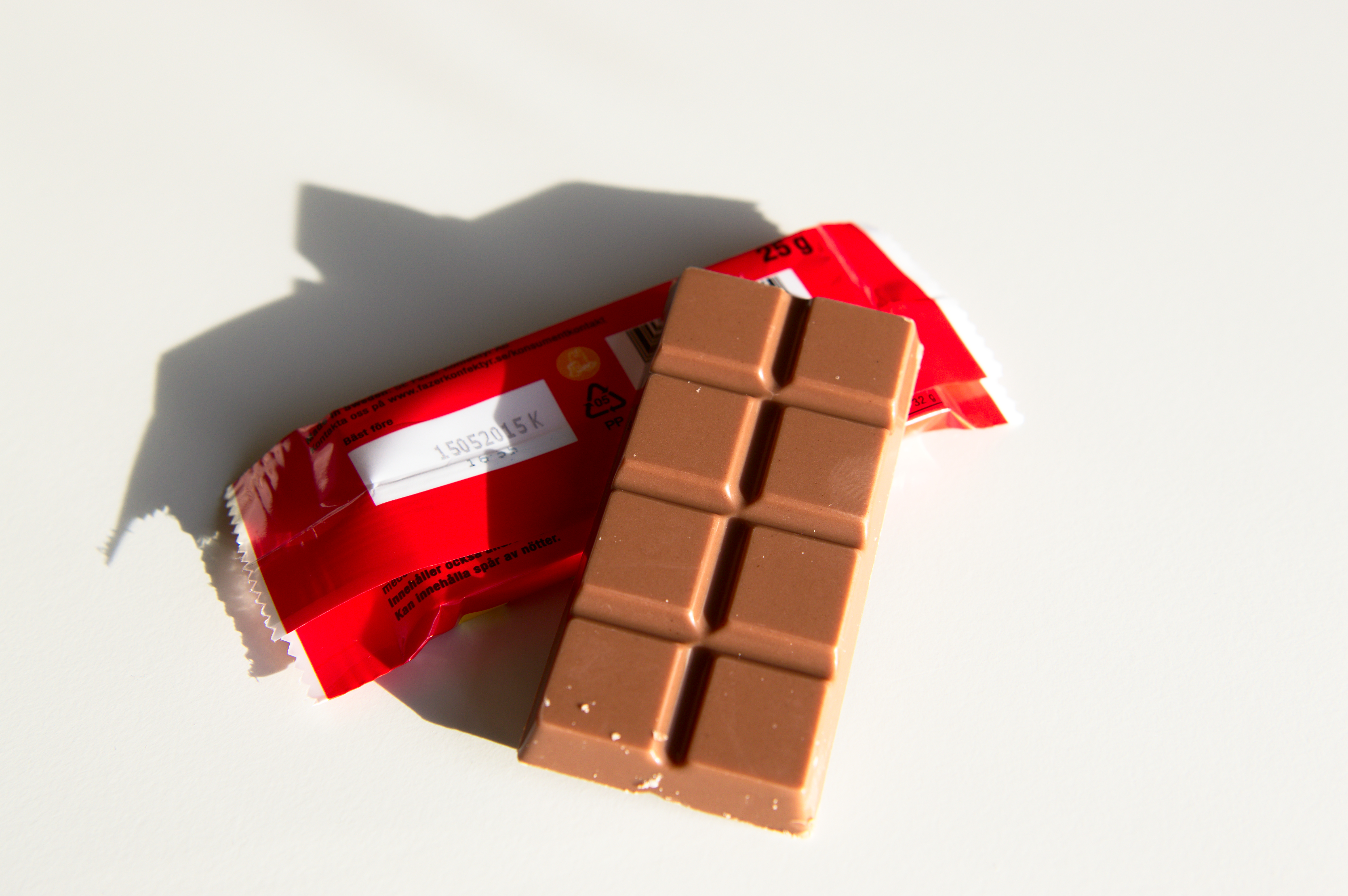 "Palle Kuling" chokladbit